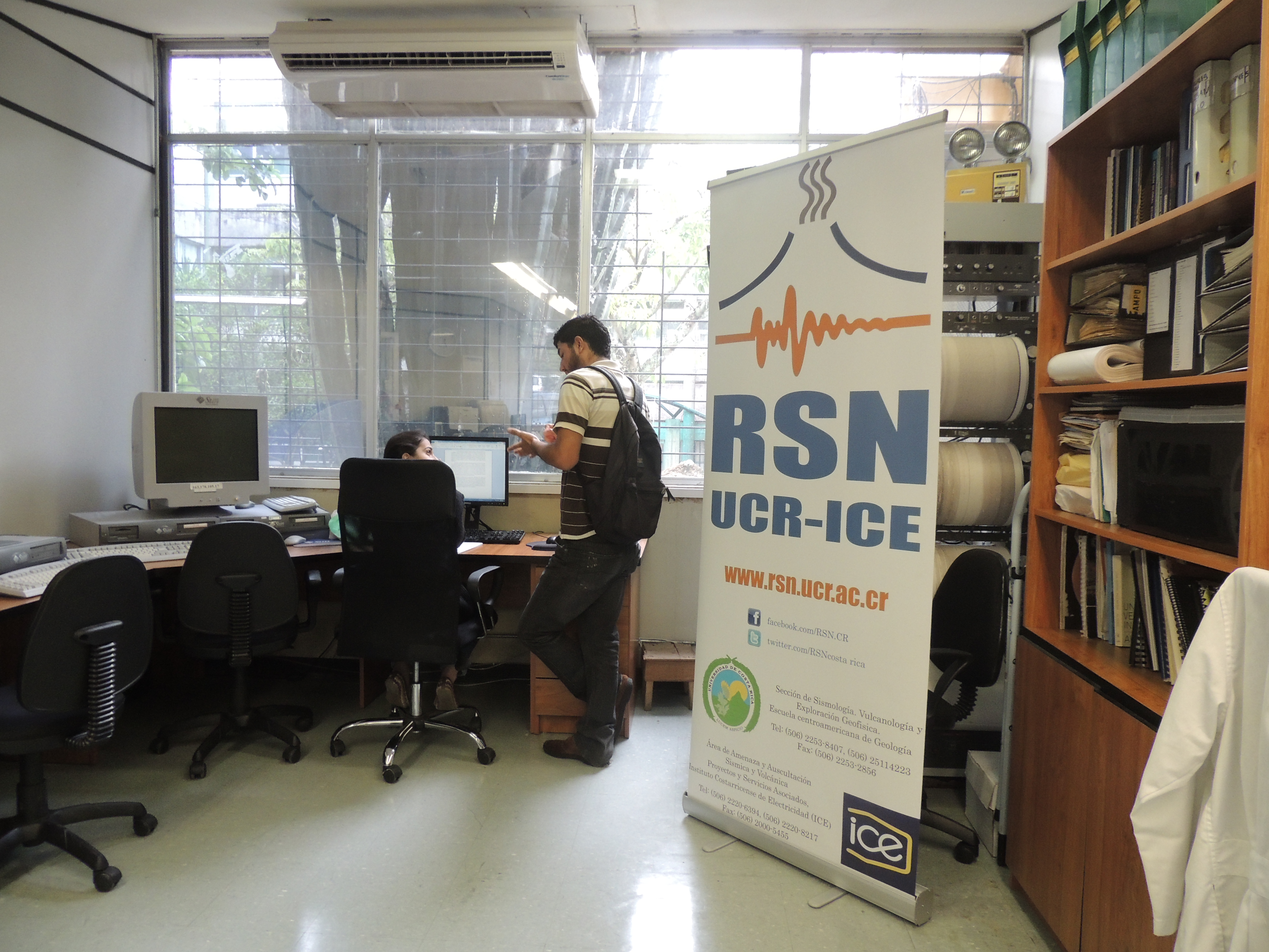 Laboratorio de la Red Sismológica Nacional de Costa Rica